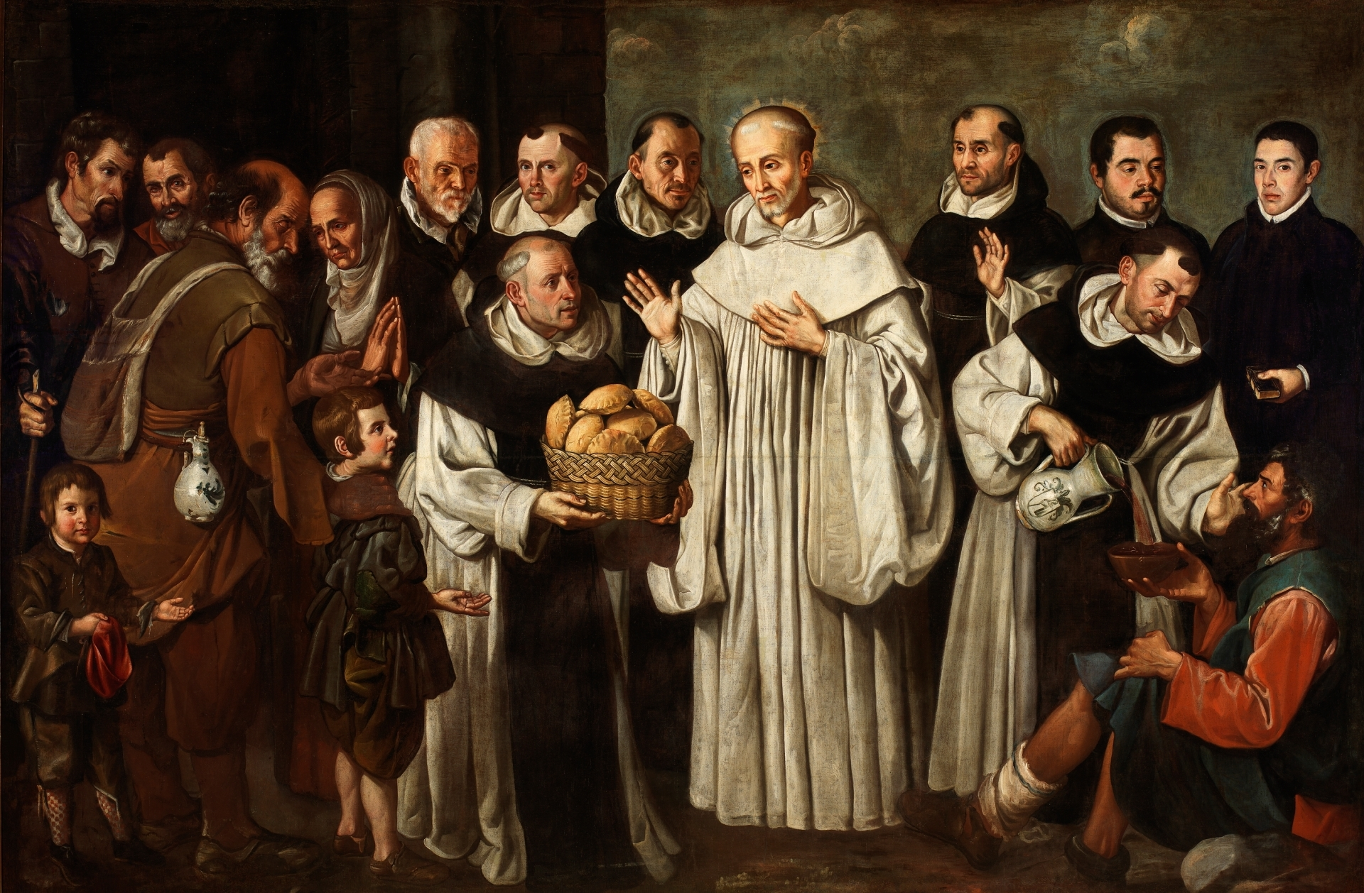 La obra representa un milagro realizado por San Bernardo de Claraval.